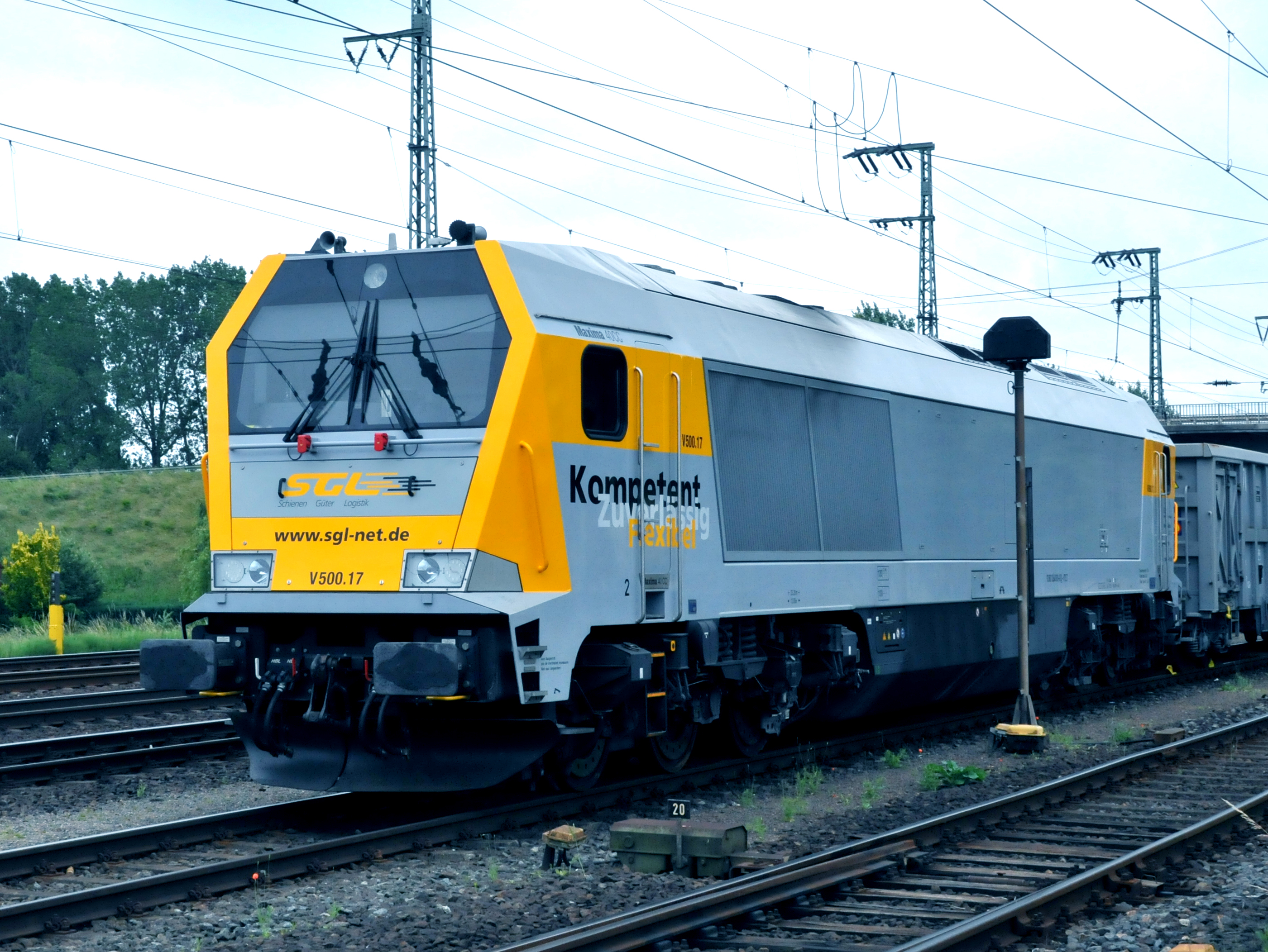 Schienen Güter Logistik (SGL) locomotief V500.17 van het type Voith Maxima 40CC te Leer (Ostfriesland). UIC nummer: 92 80 1264 010-0 D-VTLT.